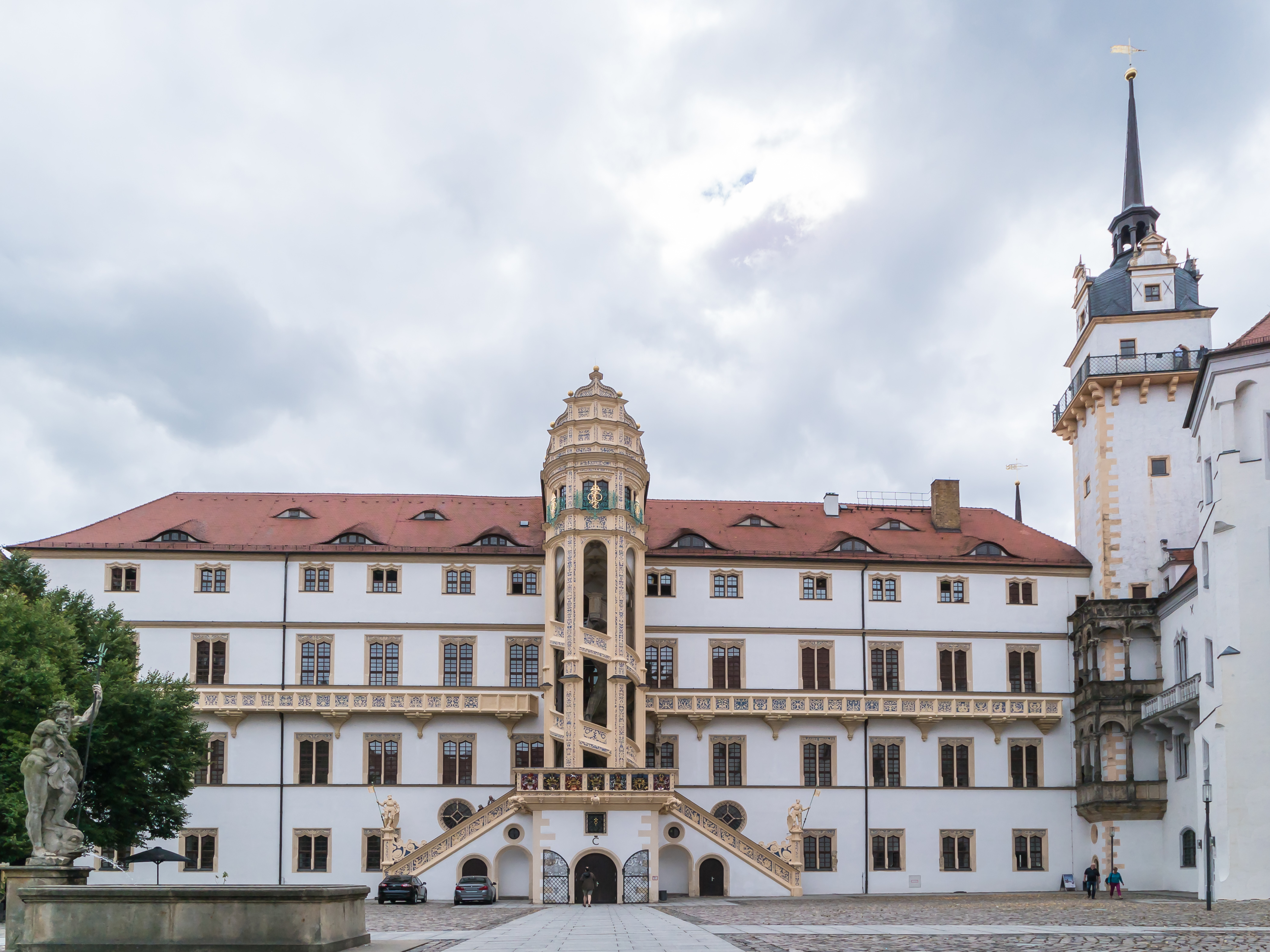 Schloss Hartenfels, Großer Wendelstein und Hausmannsturm in Torgau